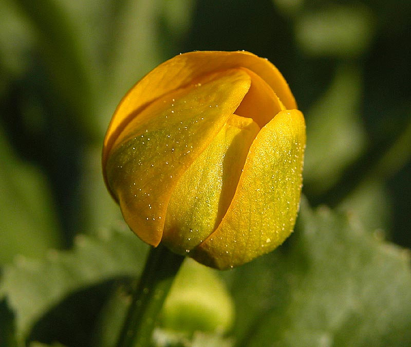 Sumpfdotterblume (Caltha palustris), aufgenommen am Krebsbach unterhalb vom Dörfelsberg in Buseck